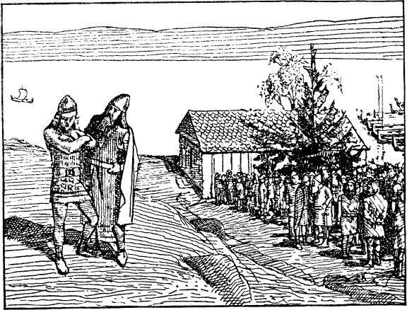 Christian Krogh: Illustration for Håkon den godes saga saga, Heimskringla 1899-edition. nn: «Sigurd jarl tel kongen til å gje etter.» nb: «Sigurd jarl overtaler kongen til å gi etter.»